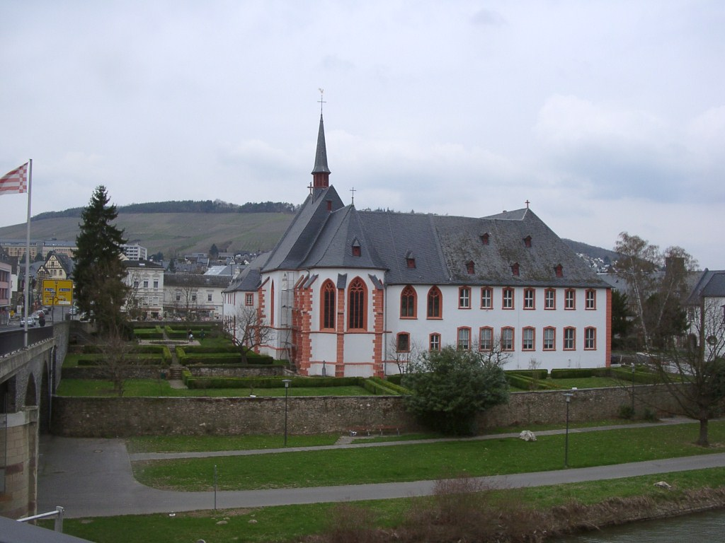 Bernkastel-Kues Nikolausstift